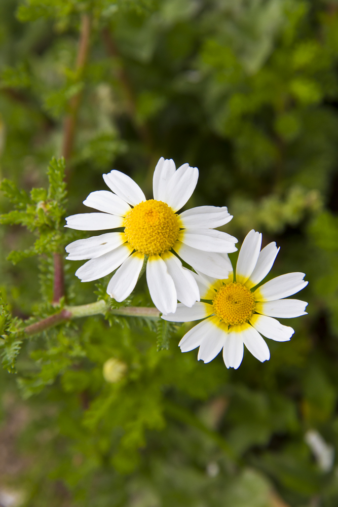 A macela mariña, Matricaria maritima tamén chamada Tripleurospermum maritimum, é unha especie vexetal característica das dunas litorais. Imaxe tomada na Illa de Arousa.